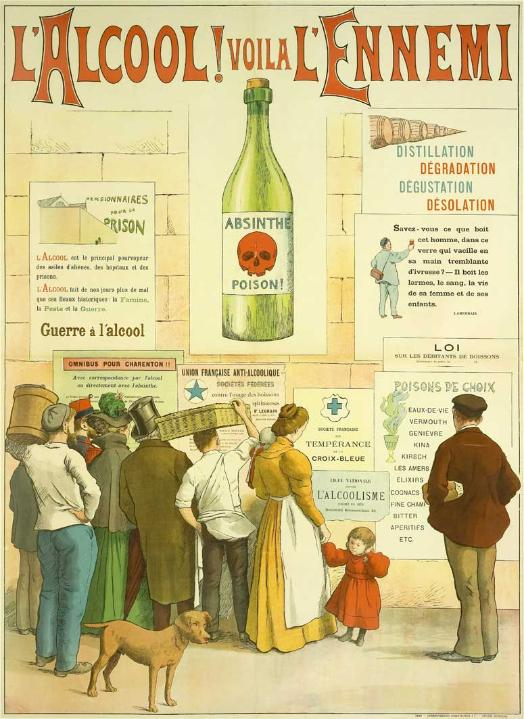 Poster by French painter and missionary Frédéric Christol (1850-1933) warning of the dangers of absinthe and other alcoholic drinks. Main captions: "Alcool ! Voilà l'ennemi." "Pensionnaires pour la prison. L'alcool est le principal pourvoyeur des asiles d'aliénés, des hôpitaux et des prisons. L'alocool fait de nos jours plus de mal que ces fléaux historiques : la famine, la peste et la guerre." "Omnibus pour Charenton !! Avec correspondance par l'alcool ou directement avec l'absinthe." "Absinthe poison !" "Distillation dégradation. Dégustation désolation." "Savez-vous ce que boit cet homme, dans ce verre qui vacille en sa main tremblante d'ivresse ? - Il boit les larmes, le sang, la vie de sa femme et de ses enfants. Lamennais."